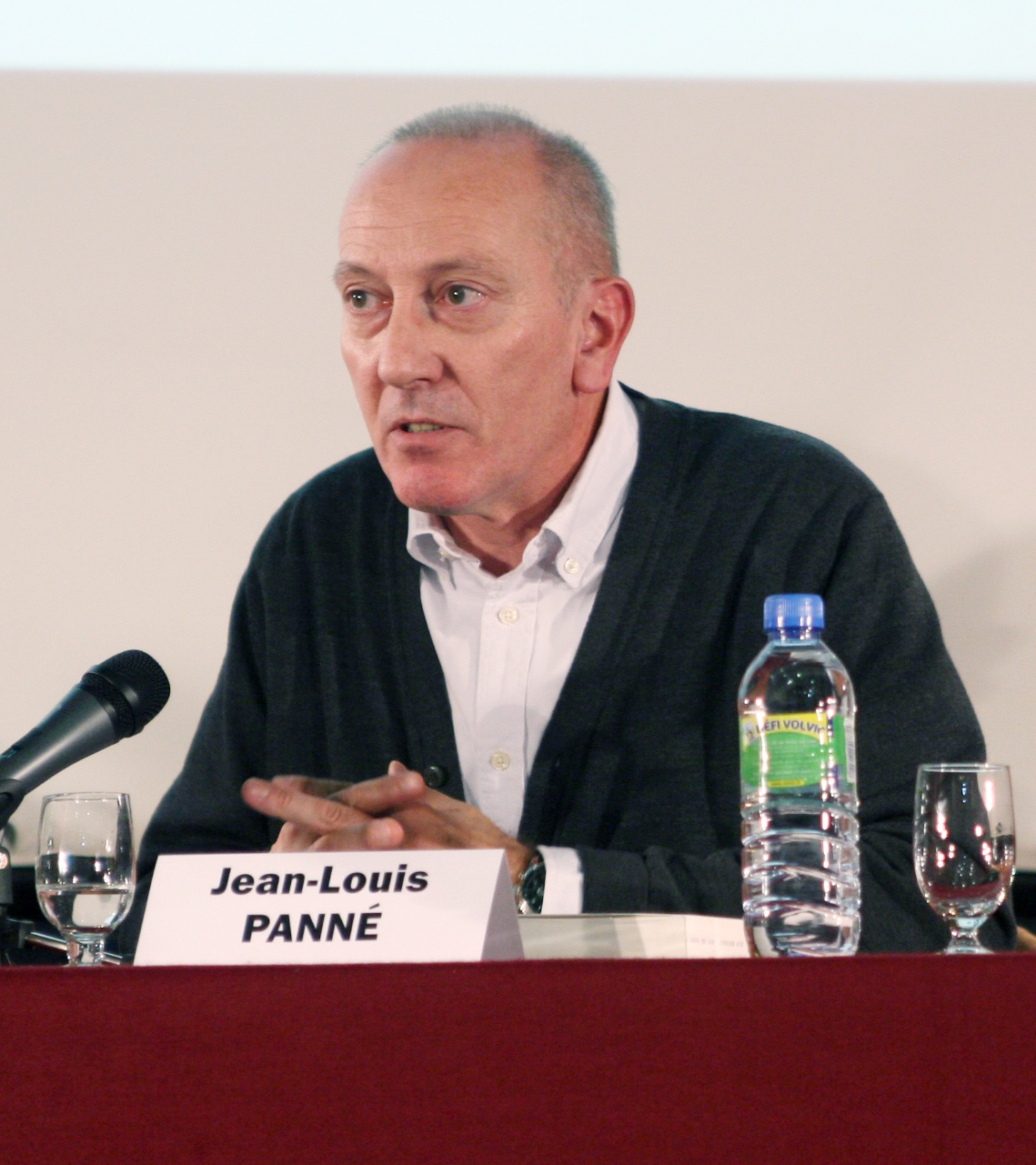 Jean-Louis Panné le 6 novembre 2009 lors du colloque international "Sortir du communisme, changer d'époque" organisé par Fondapol en partenariat avec la Fondation Robert-Schuman.